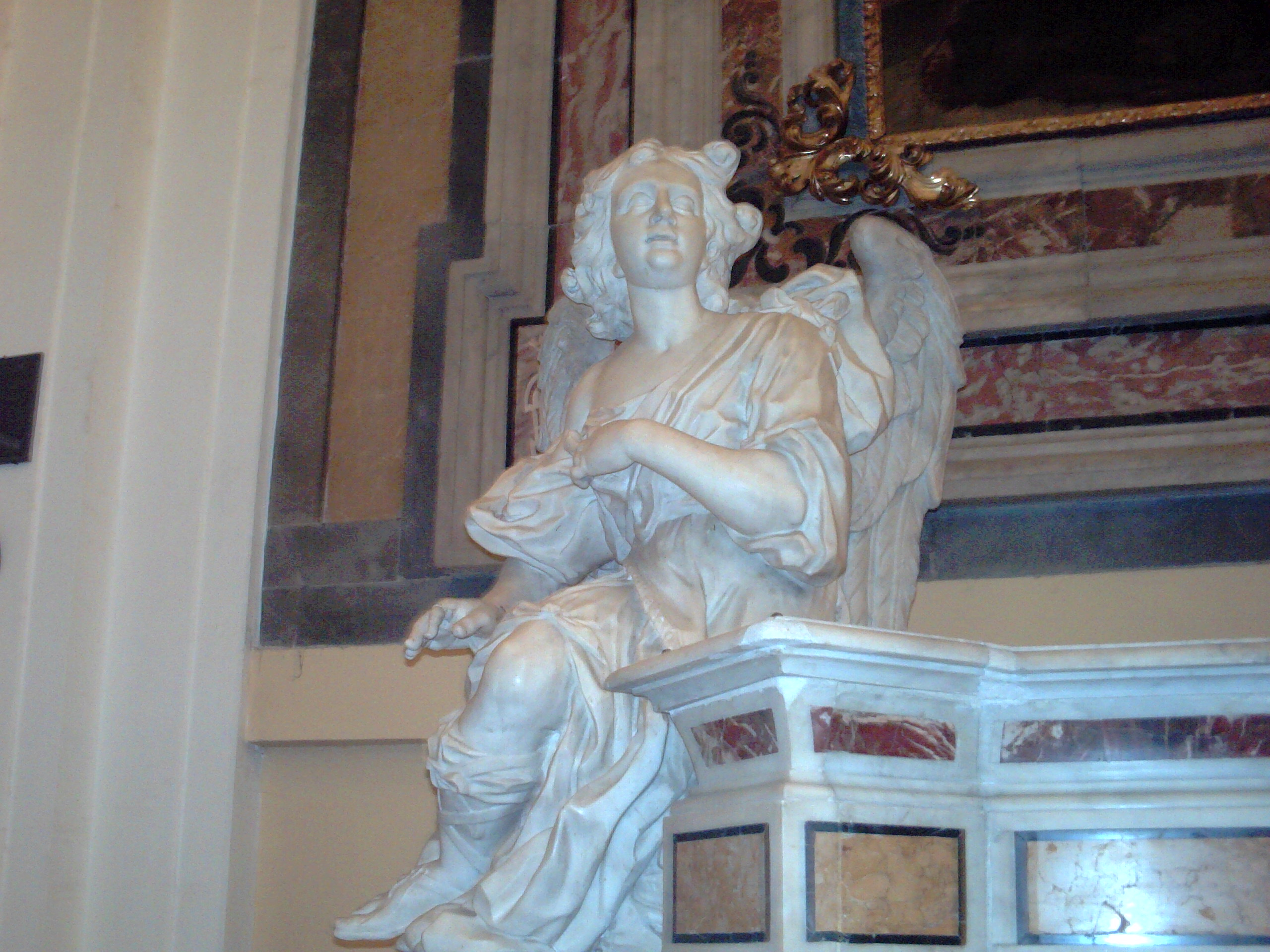 Sculture Girolamo delle Monache (Napoli)